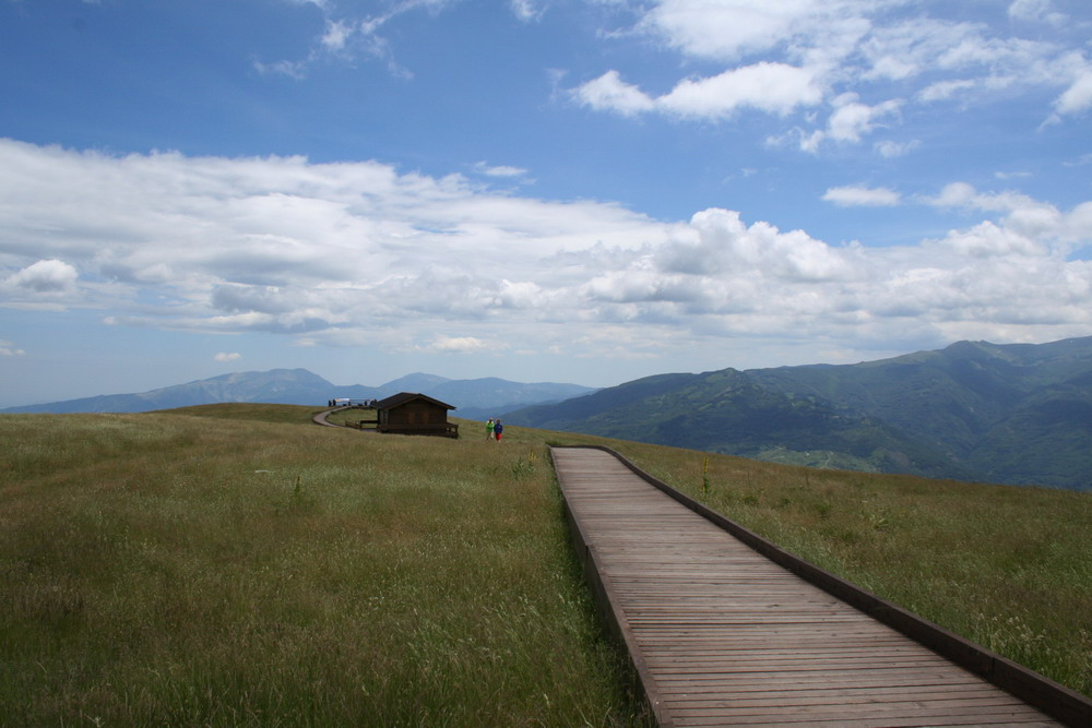 Sibilla.io, proprio scatto, Sentiero per tutti, località Forca di Presta (Ascoli Piceno), esterno giorno, 17 giugno 2007,"Utilizzo concesso" This file is licensed under Creative Commons 2,5 license